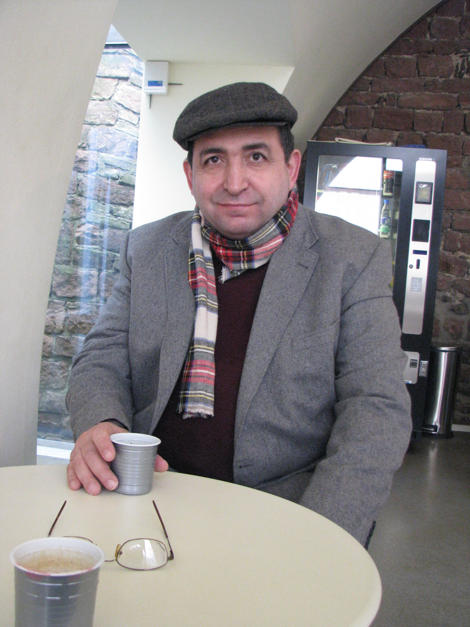 Foto